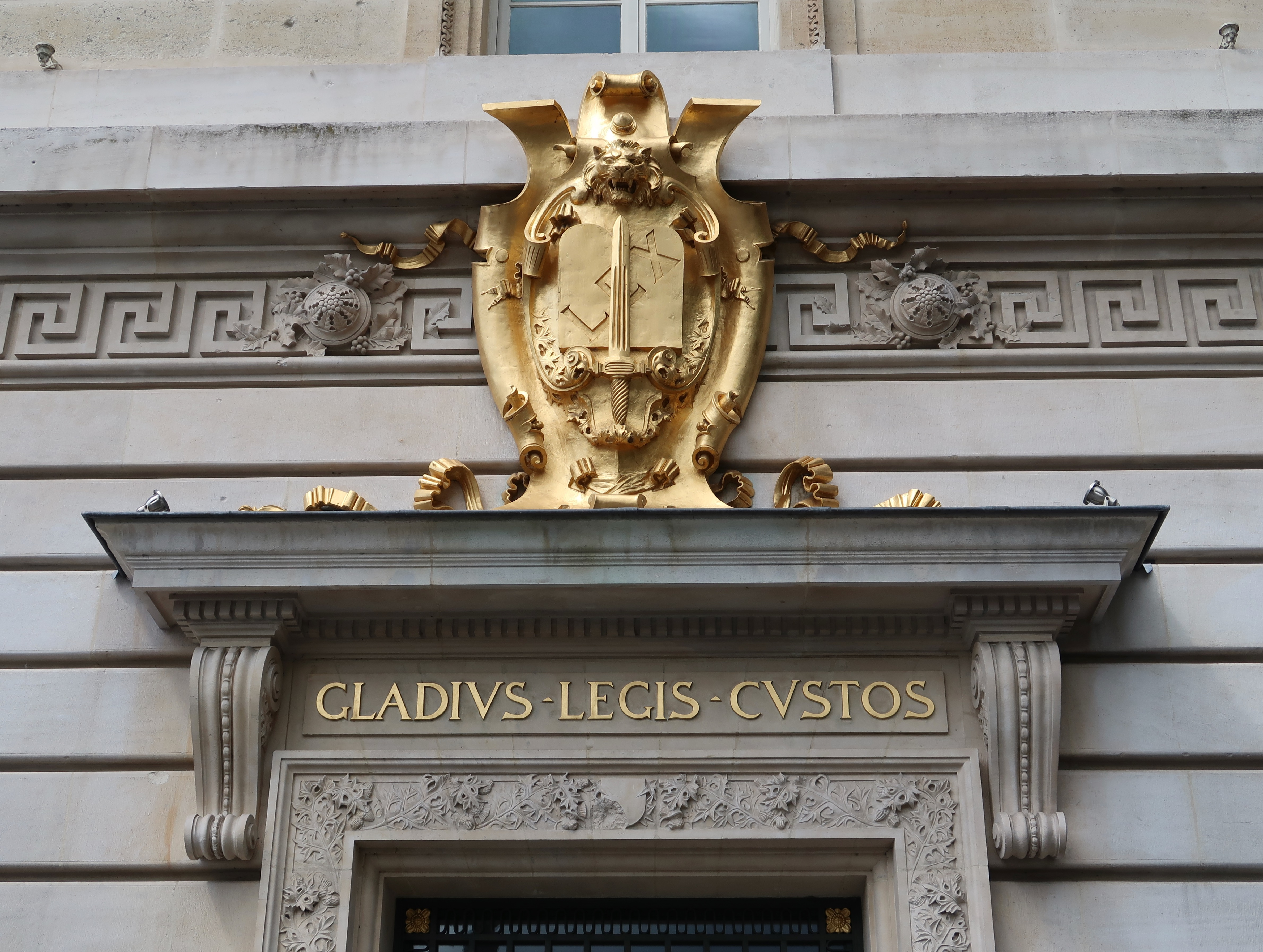 Locution latine Gladius legis custos, à un angle du palais de justice de Paris, boulevard du Palais et quai des Orfèvres, sur l'île de la Cité.